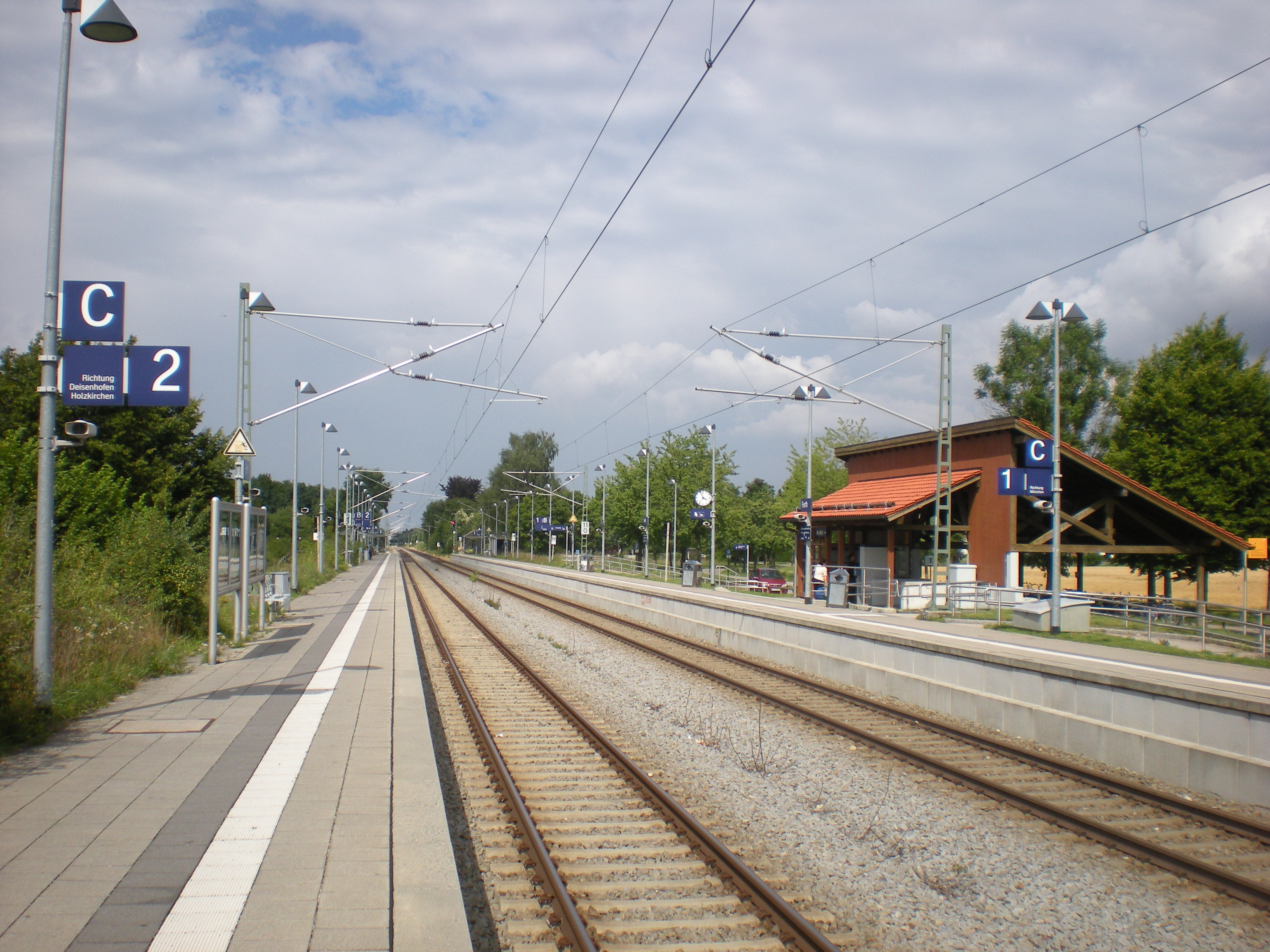 Seitenbahnsteige des S-Bahnhaltepunkts Furth (b Deisenhofen)